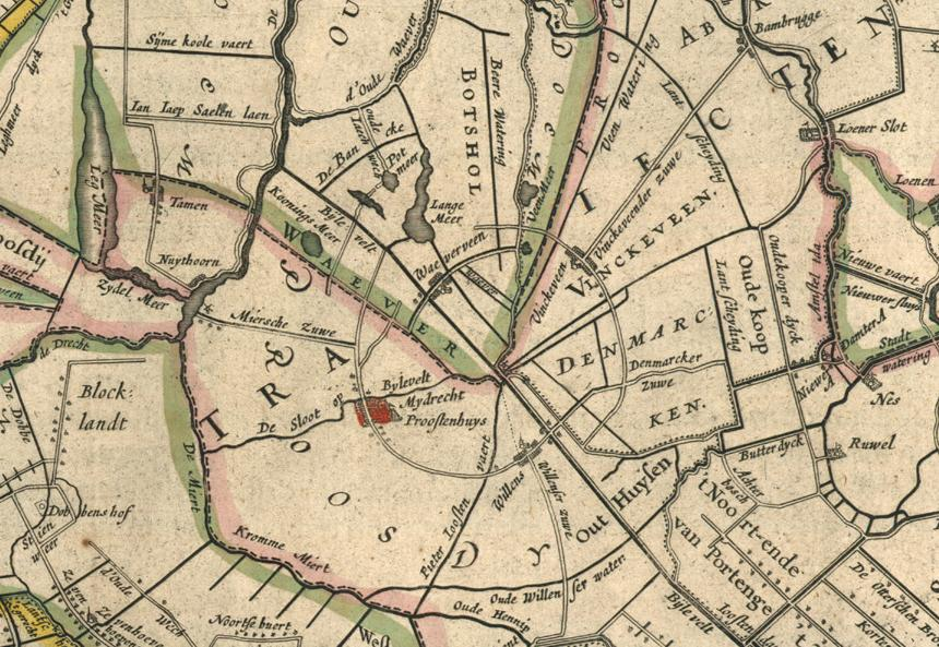 De_Ronde_Venen, Rijnland amstelland atlasmaior